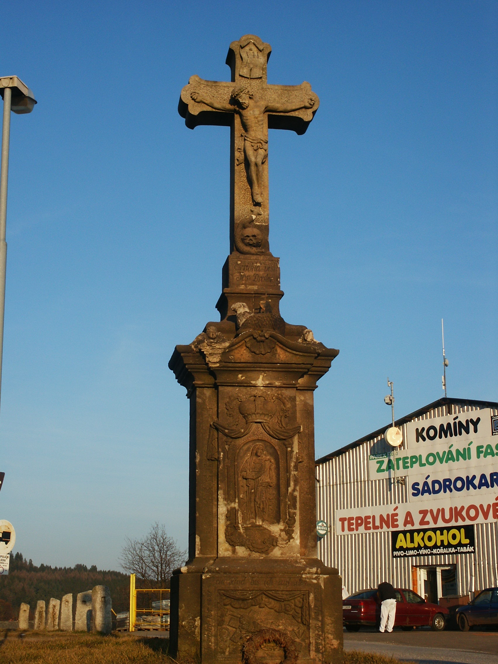 Vidochov - kamenný kříž